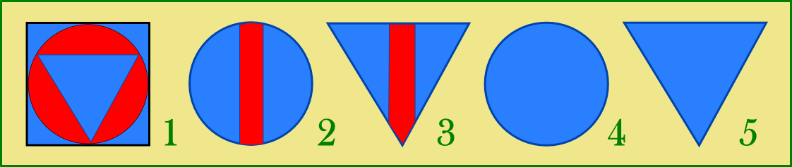 Znaki taktyczne na pojazdach pancernych stosowane w II RP: 1 - wóz dowódcy szwadronu; 2 - wóz dowódcy 1 plutonu; 3 - wóz dowódcy 2 plutonu; 4 - wóz z 1 plutonu; 5 - wóz z 2 plutonu.